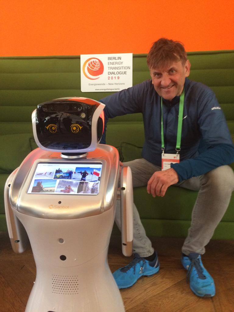 Marek Kamiński wraz z robotem humanoidalny Noa.